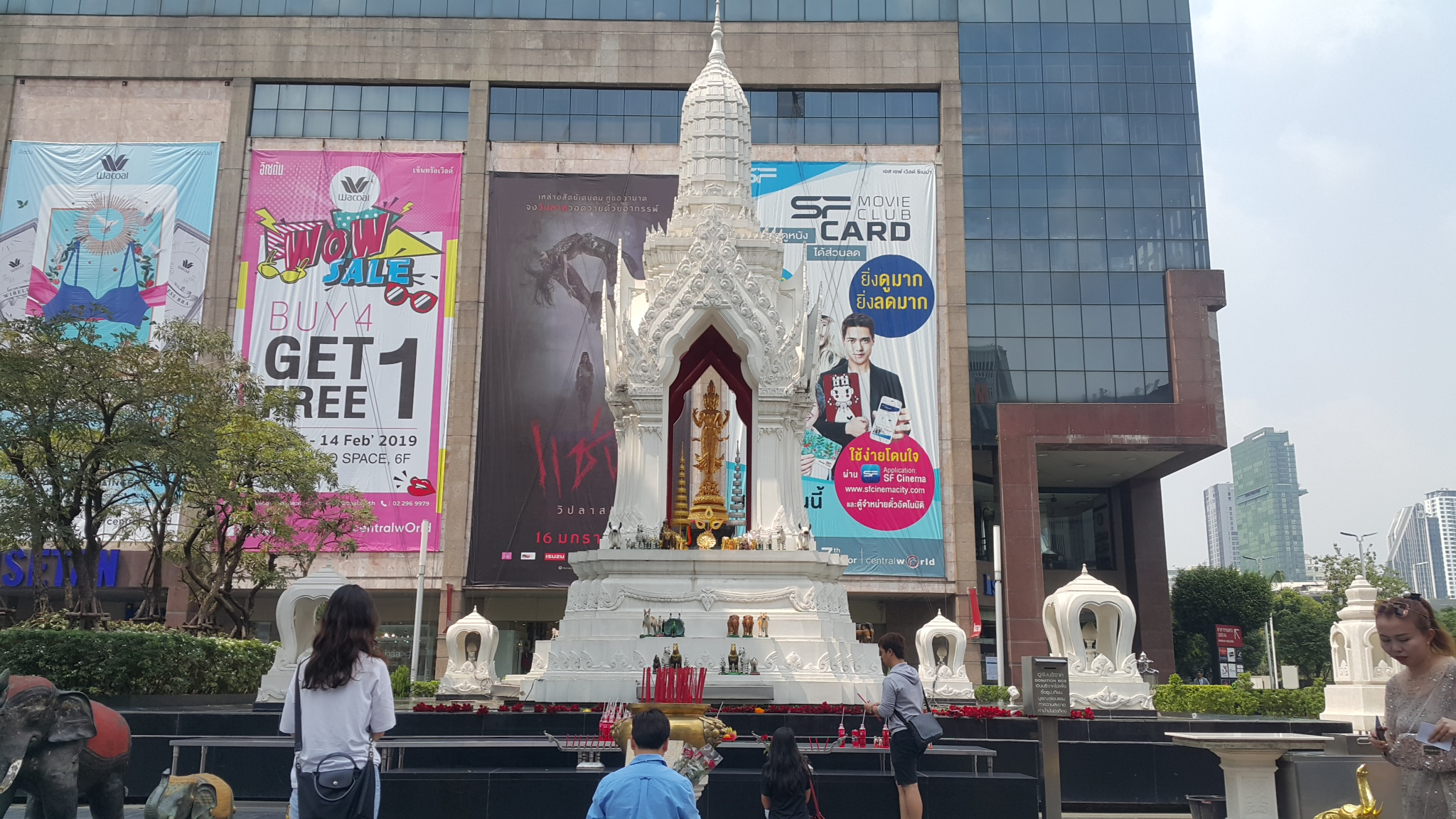 ศาลพระตรีมูรติ เซ็นทรัลเวิลด์ อิเซตัน กรุงเทพมหานคร